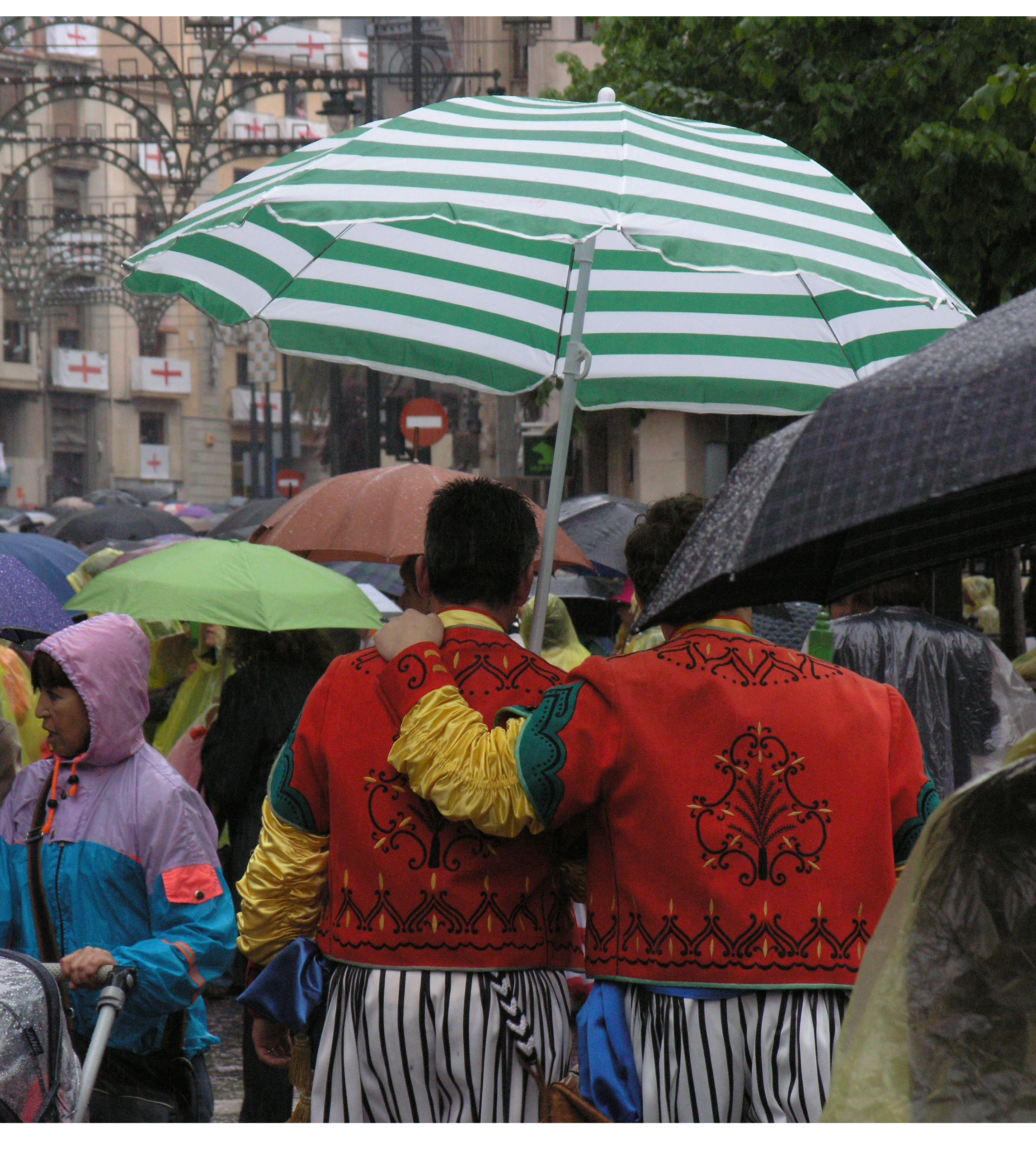 Entrada de Moros entrada de moros Alcoi,23- 04- 2006.